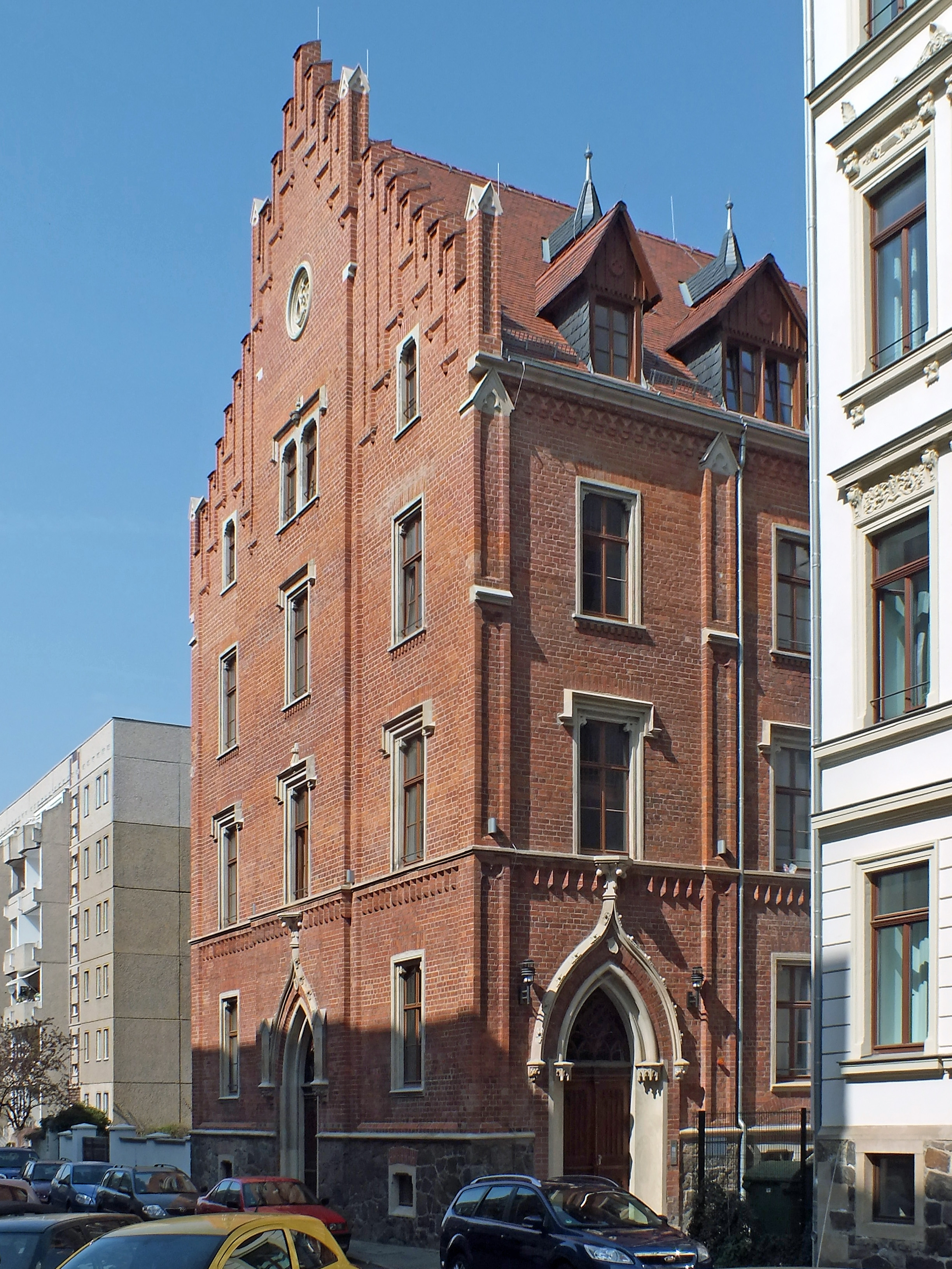 Das restaurierte, 1855 von Friedrich Wilhelm Lindner erbaute Wohnhaus Seeburgstraße 47 in Leipzig (heute Studentenwohnheim)